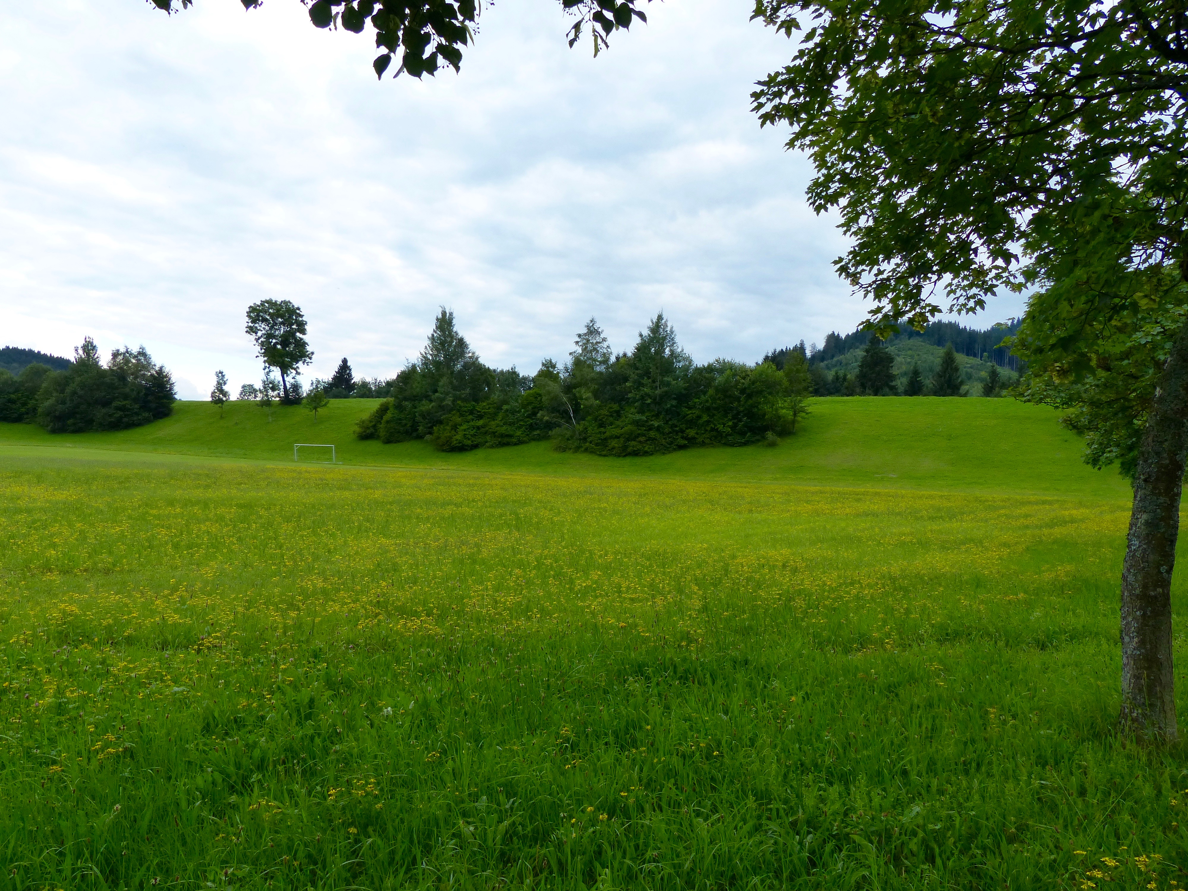 WikiProjekt Landstreicher 2016: Geotop Moränenwall bei Seltmans